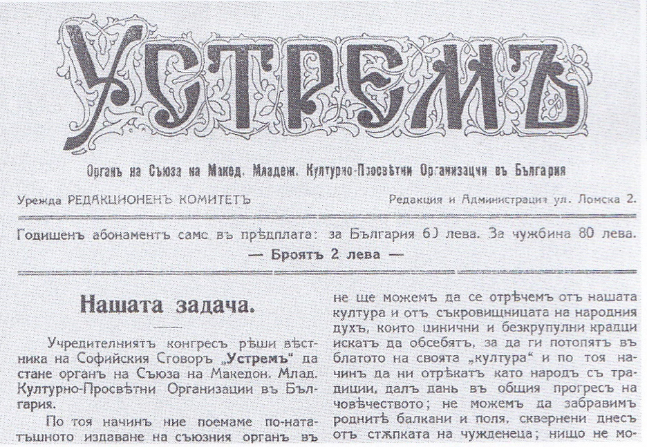 front page